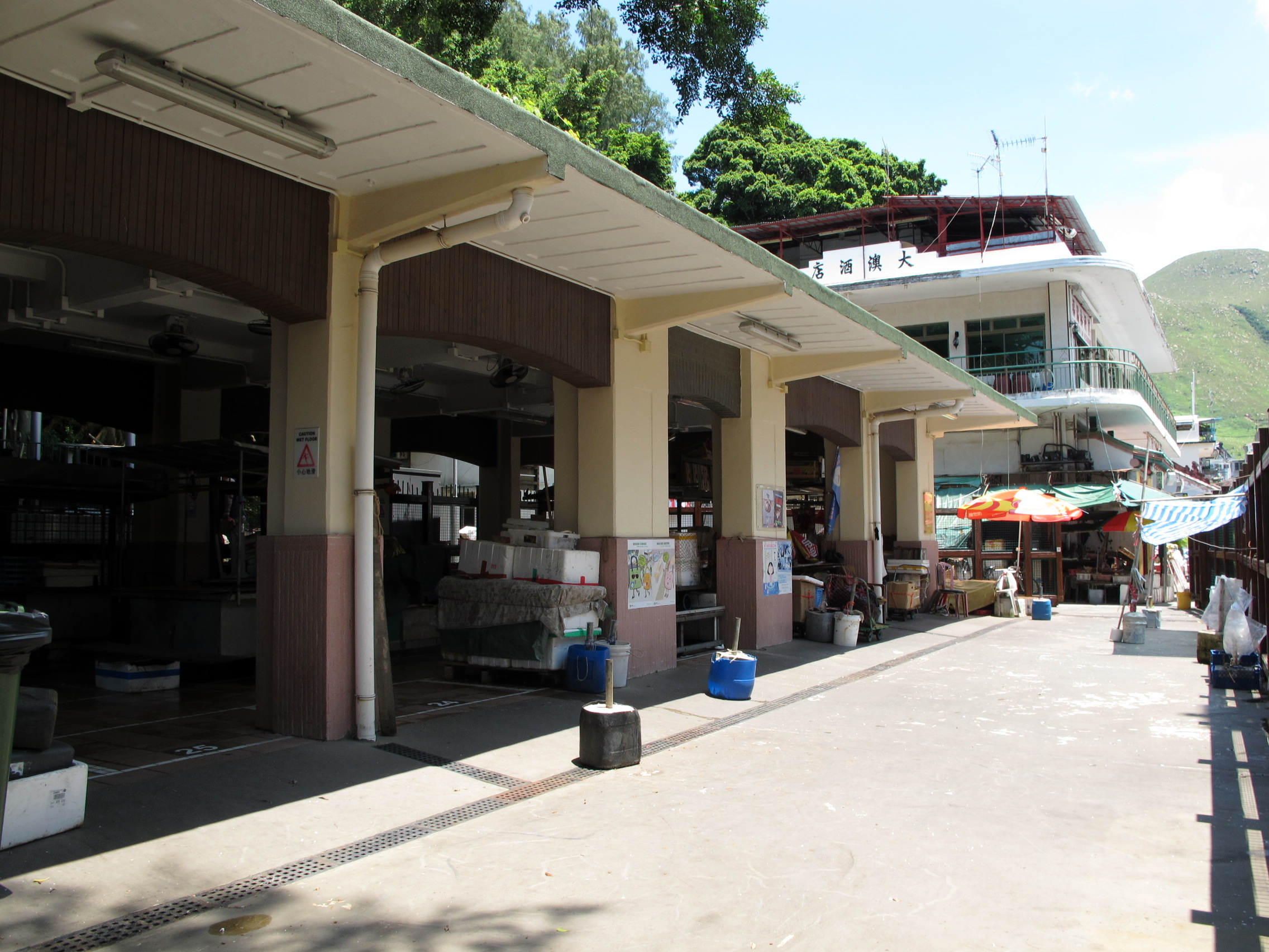 Tai O Old Market